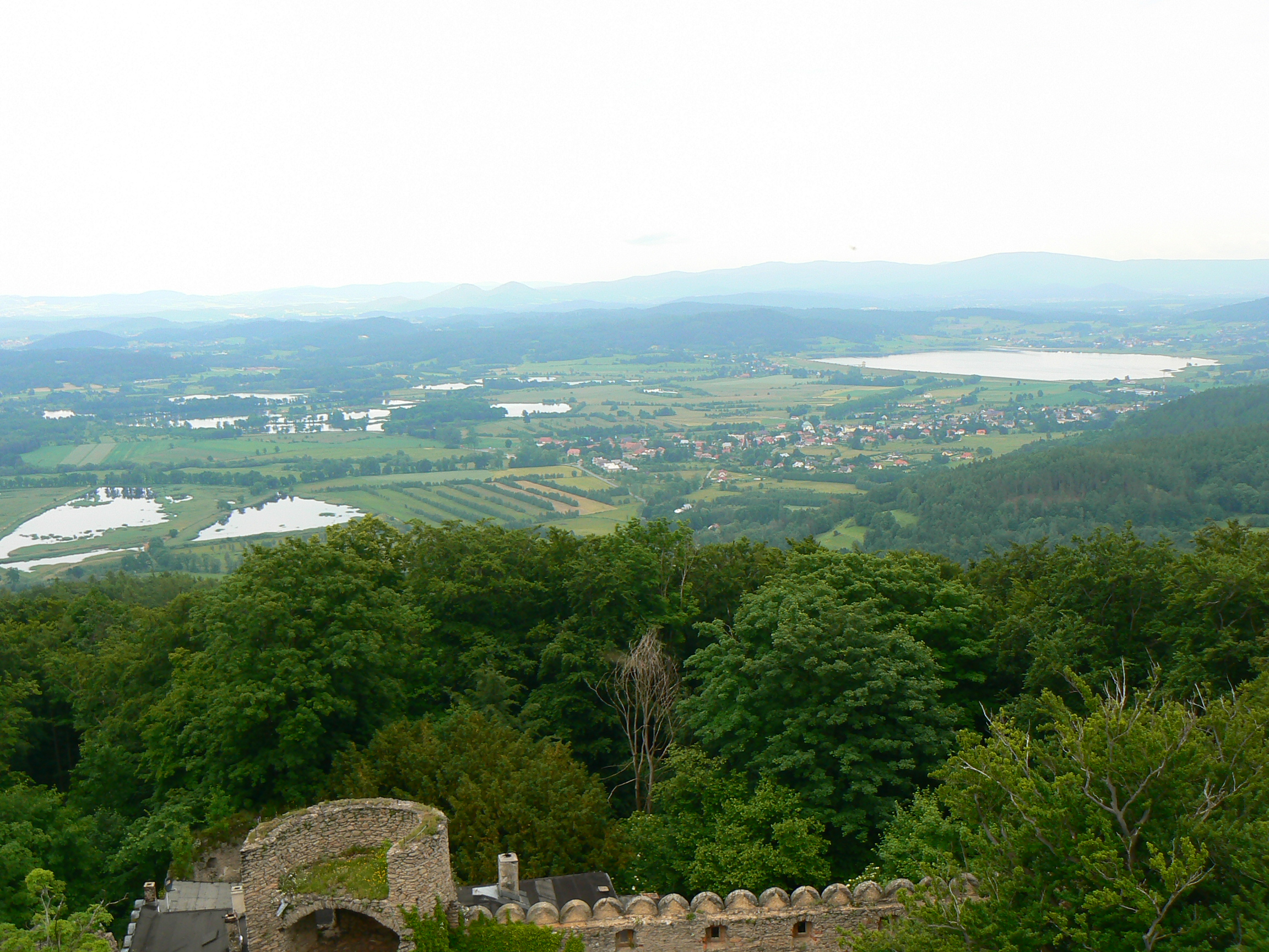 Podgórzyn – wieś w Polsce położona w województwie dolnośląskim, w powiecie jeleniogórskim, w gminie Podgórzyn – widok z zamku Chojnik.